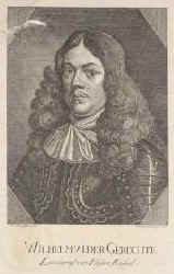 Wilhelm VI. (Hessen-Kassel), 1629–1663